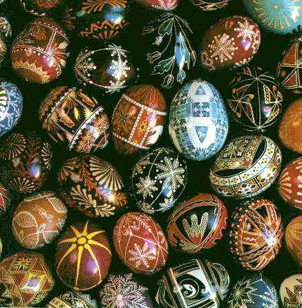 Ukrainian Easter eggs